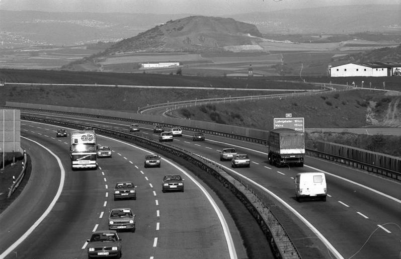 Autobahn - A 61 Starker Reiseverkehr zwischen Mendig und Plaidt